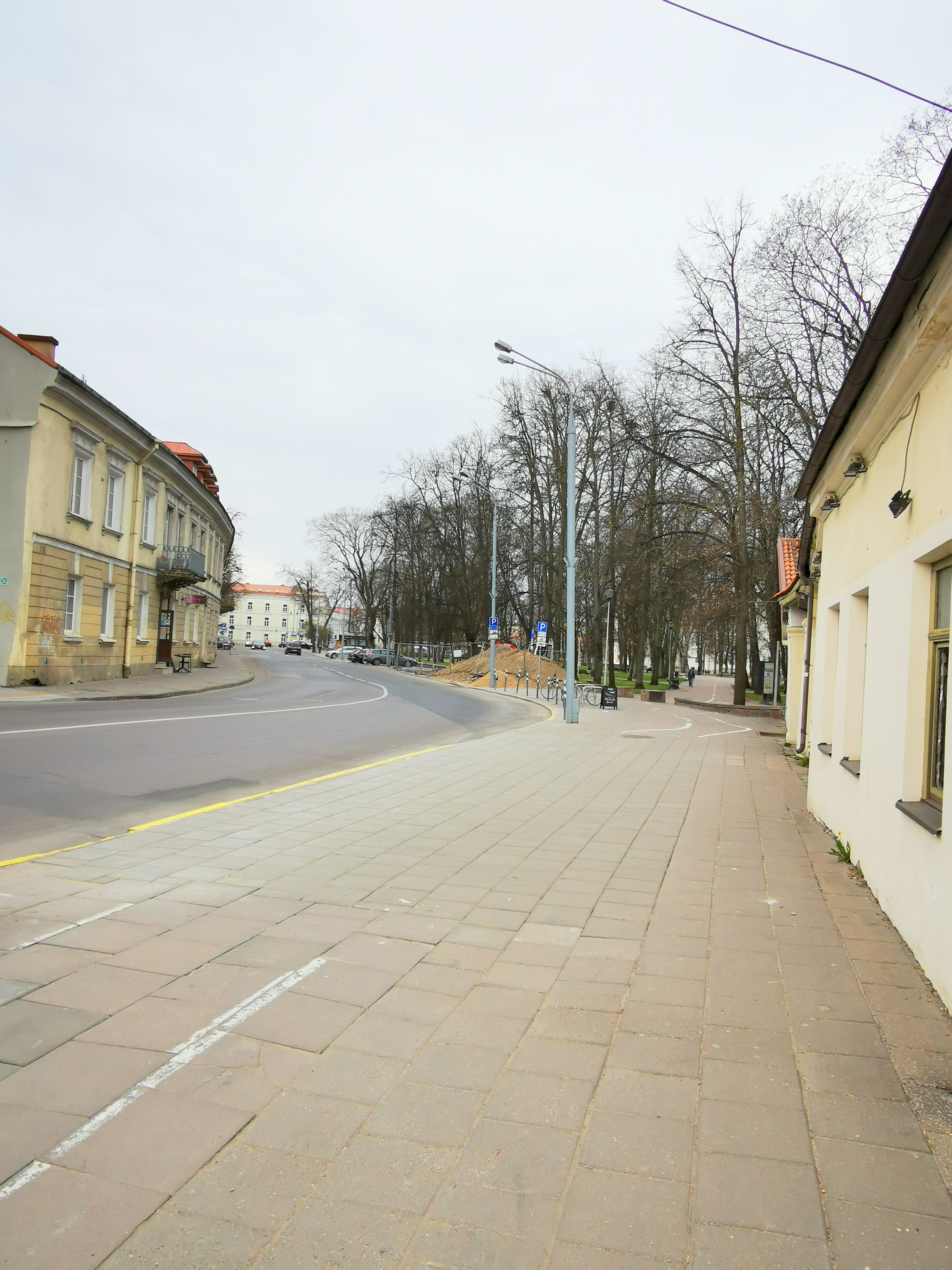 Barboros Radvilaitės gatvė